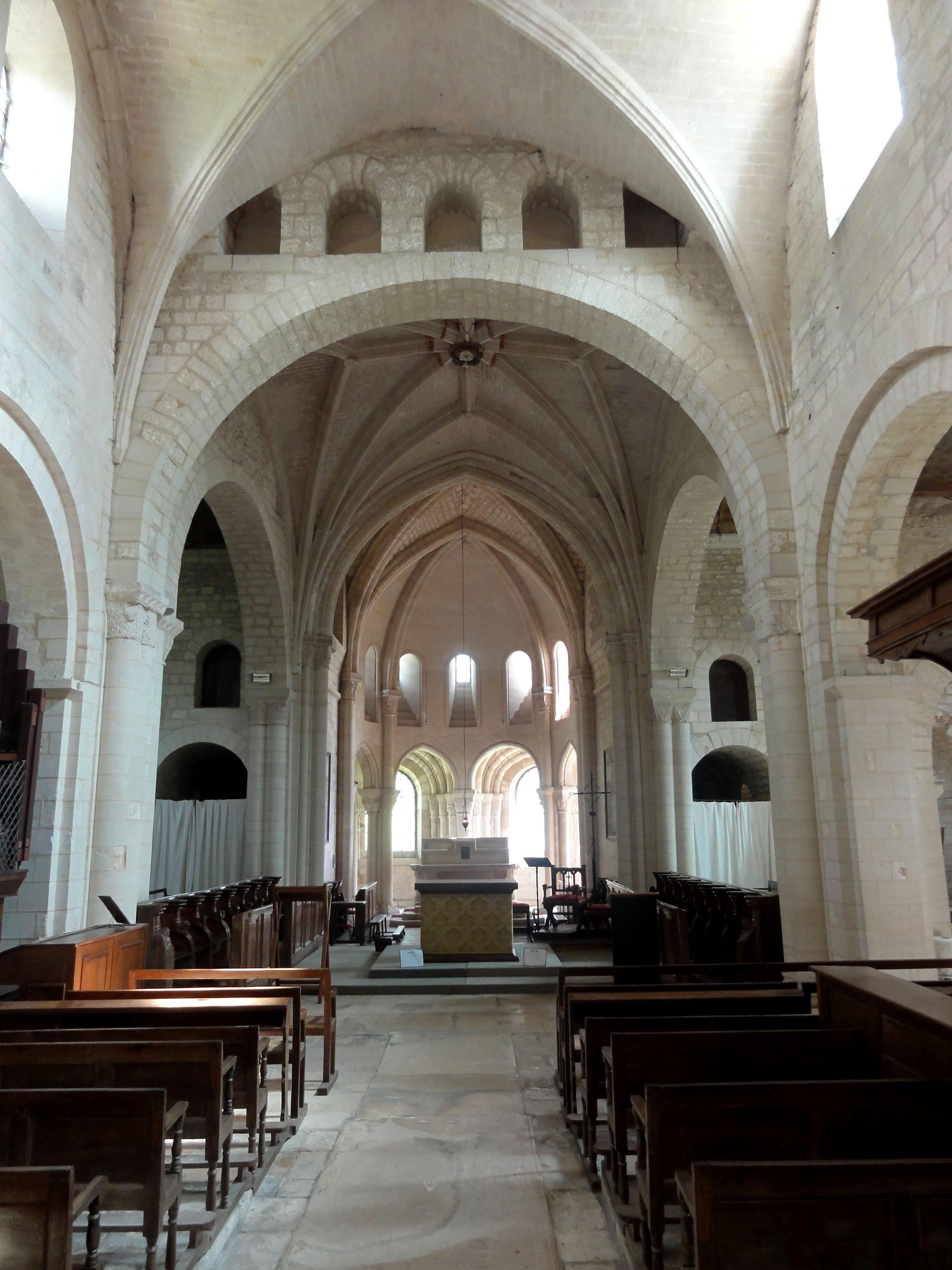 Nef, arcade vers la croisée du transept.